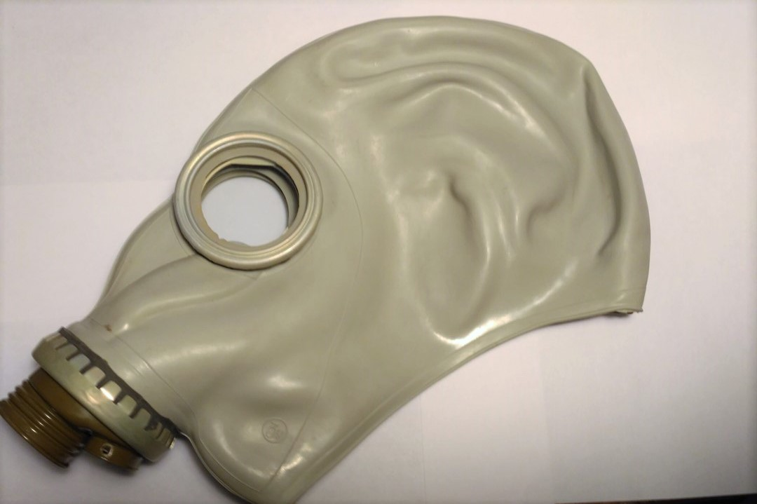 Гражданский противогаз ГП-5 — фильтрующее средство индивидуальной защиты органов дыхания, глаз и кожи лица человека. Выпускался в период с 1962 по 1989 год.